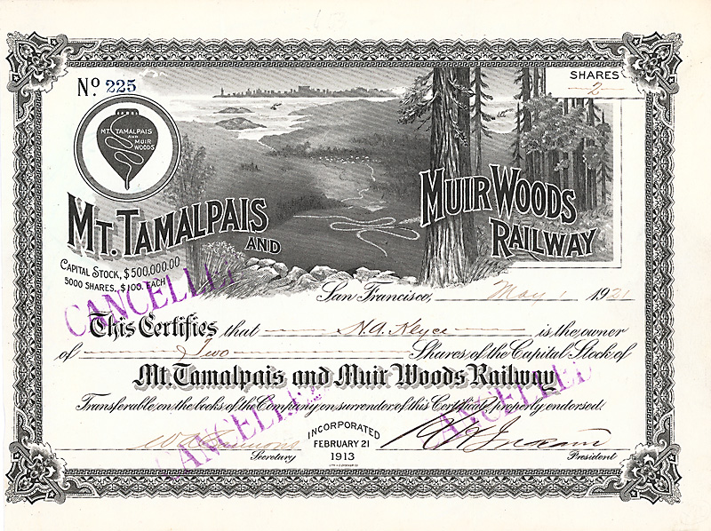 Share of the Mt. Tamalpais & Muir Woods Railway from the 1st May 1921